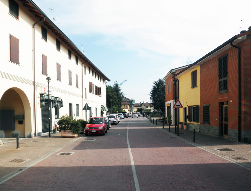 Via IV Novembre a Riozzo, fraz. di Cerro al Lambro